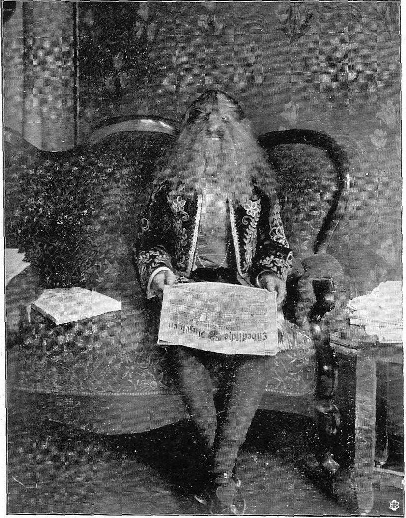 Der Mann mit der Löwenmähne. Unter der gestrickten Jacke ist die behaarte Brust sichtbar. Eigene Aufnahme im Redaktionszimmer der Lübeckischen Anzeigen.